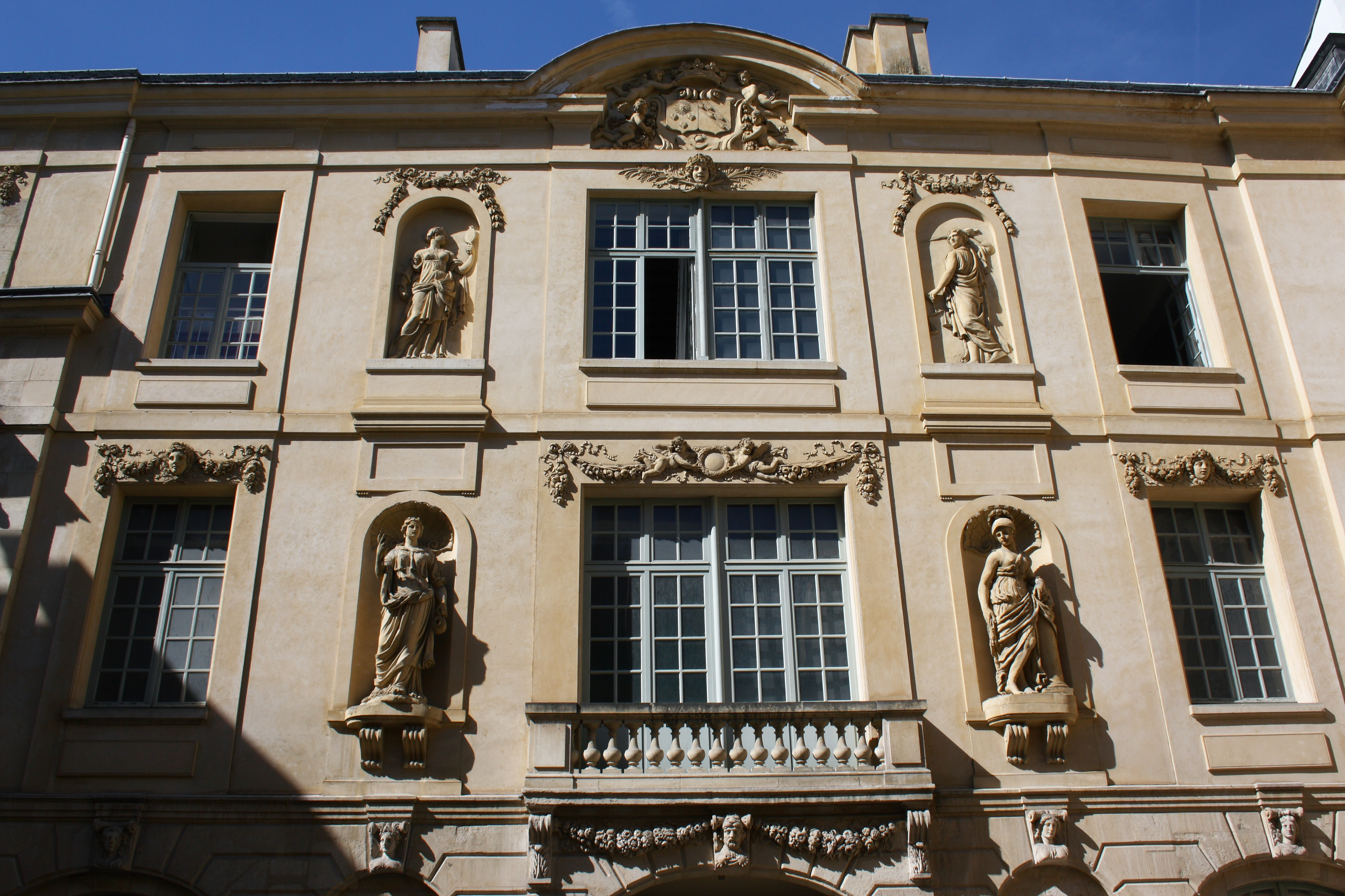 Hôtel Amelot de Bisseuil (47, rue Vieille-du-Tempel bzw. 10, rue des Guillemites im 4. Arrondissement von Paris), Fassade des zweiten Innenhofs